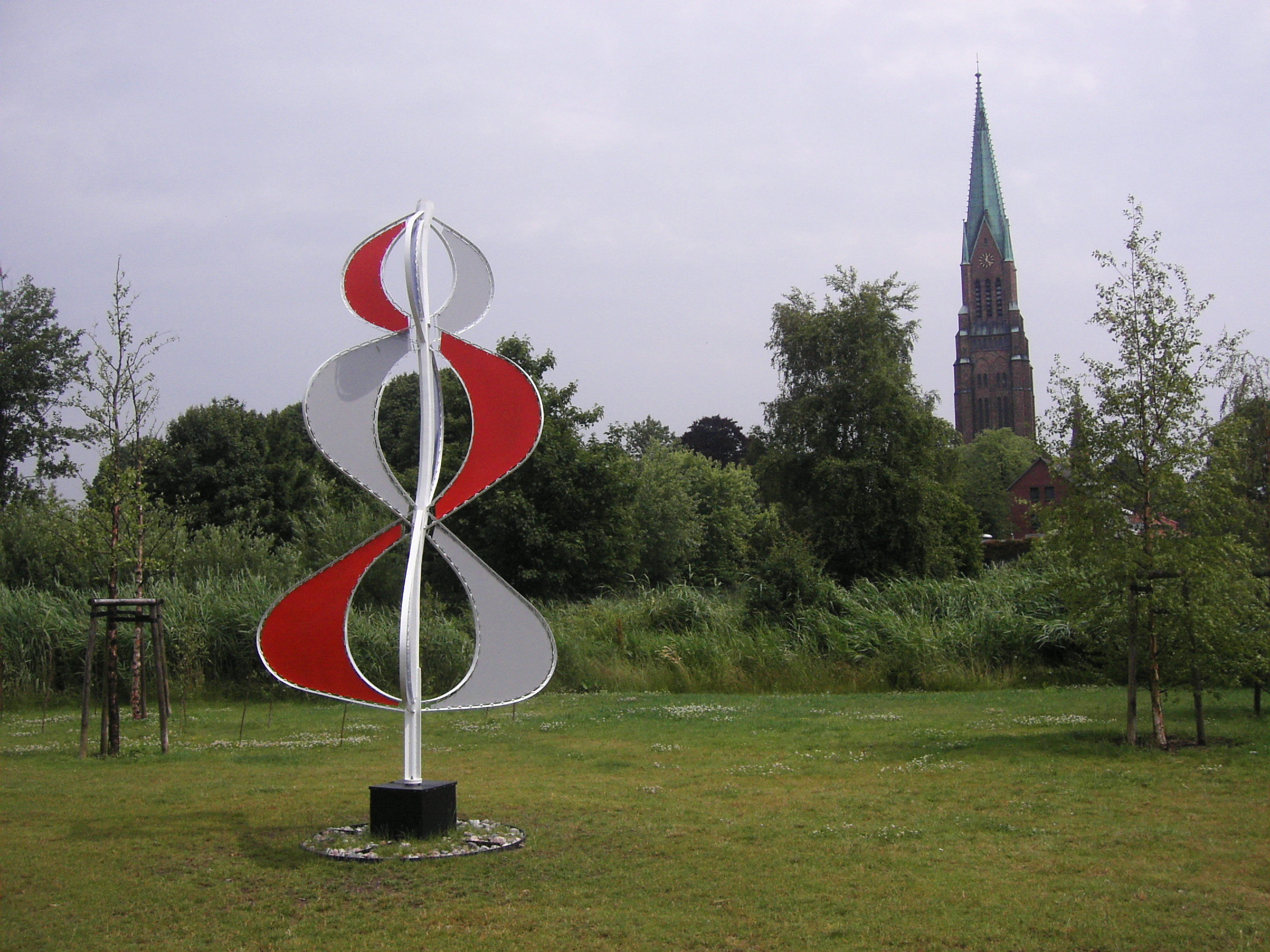 Windspiel